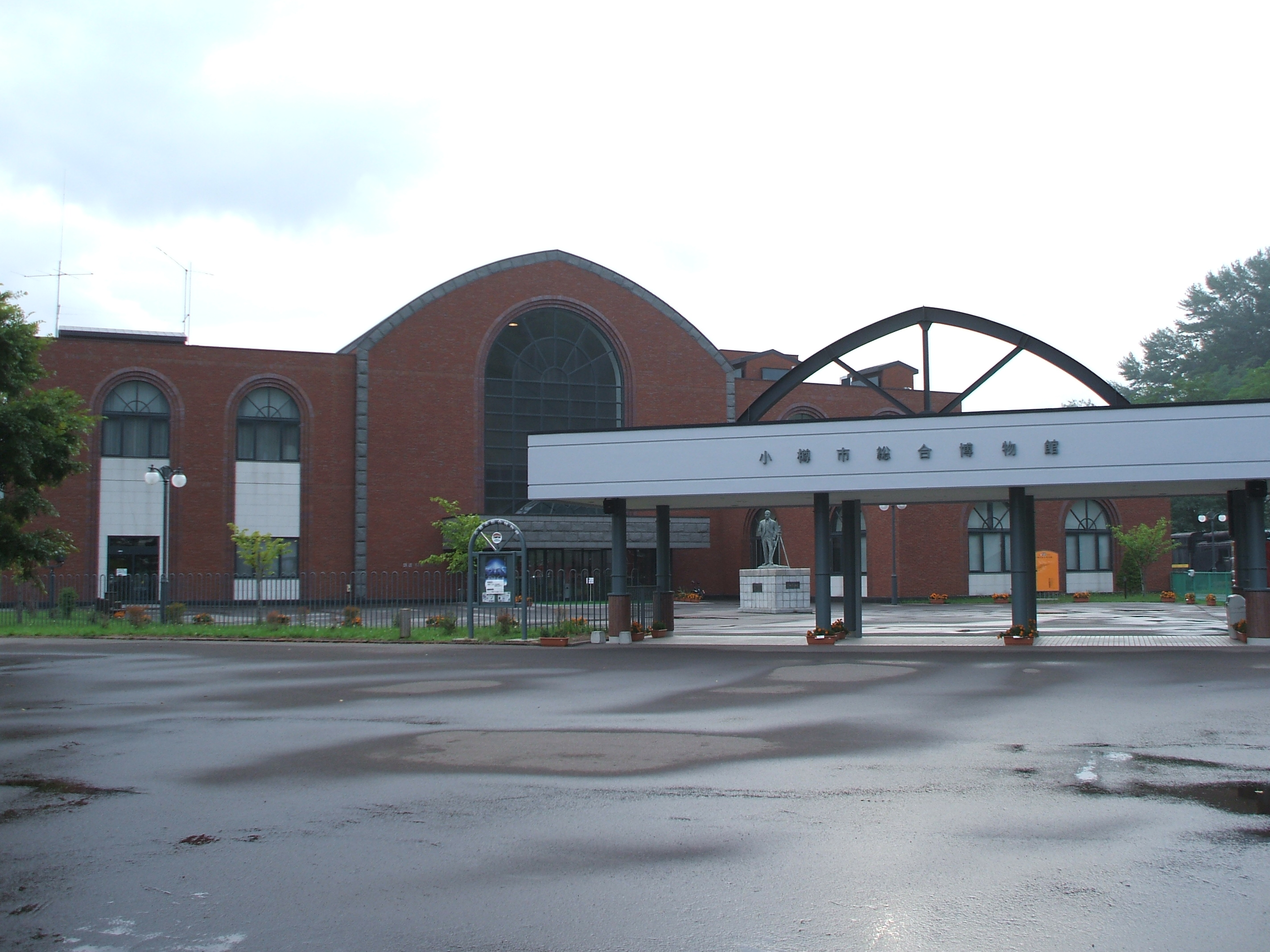 北海道小樽市にある小樽市総合博物館の正面入口 撮影日：2007年8月8日 撮影者：Twilight2640